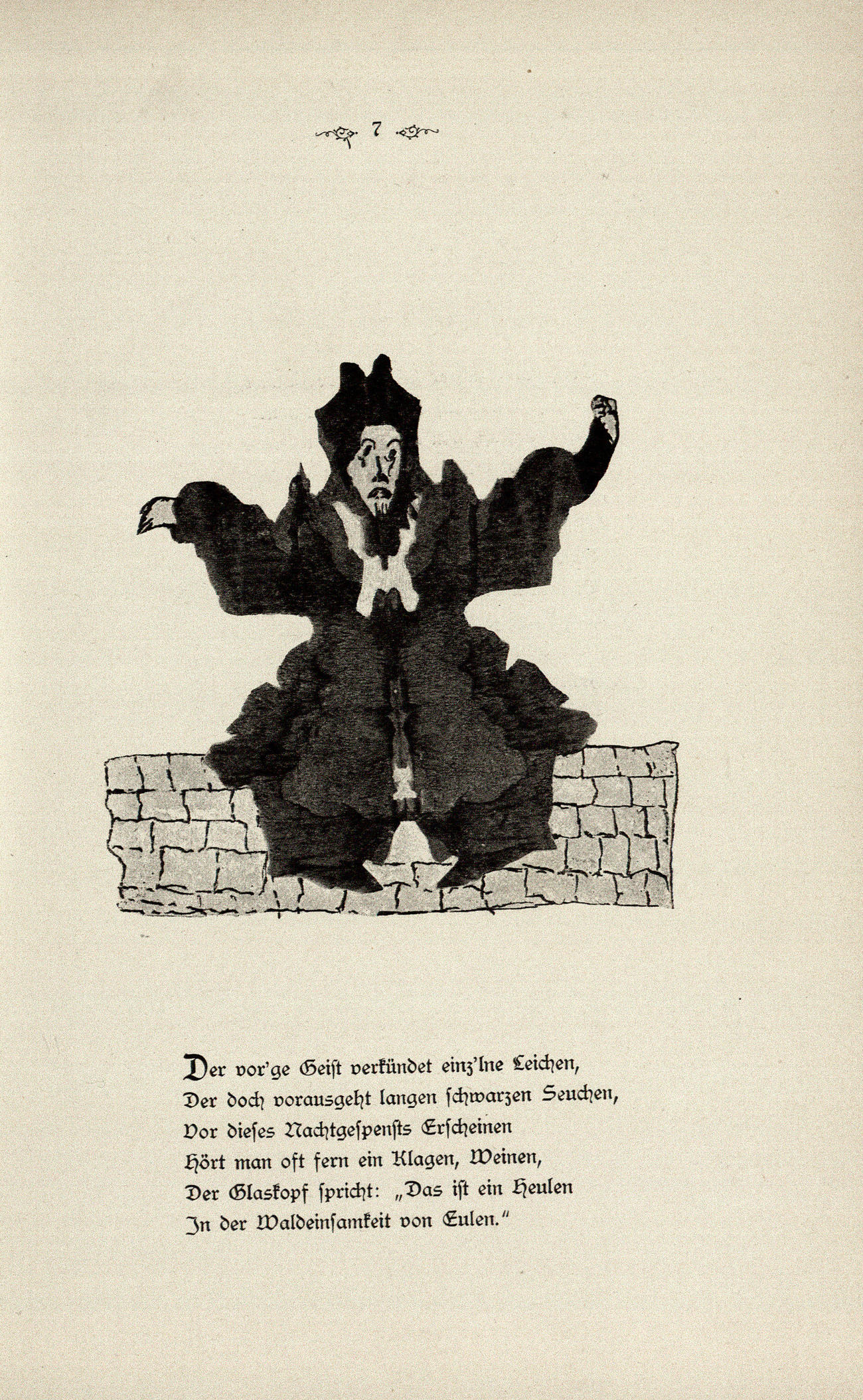 Klesksographien (Buchausgabe von 1890)